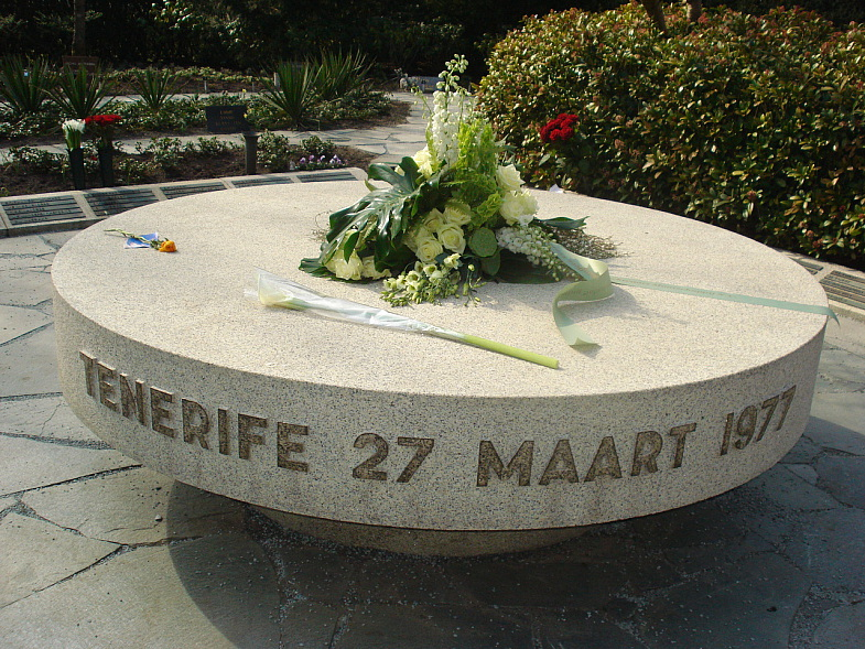 Мемориал голландским жертвам авиакатастрофы на Тенерифе.